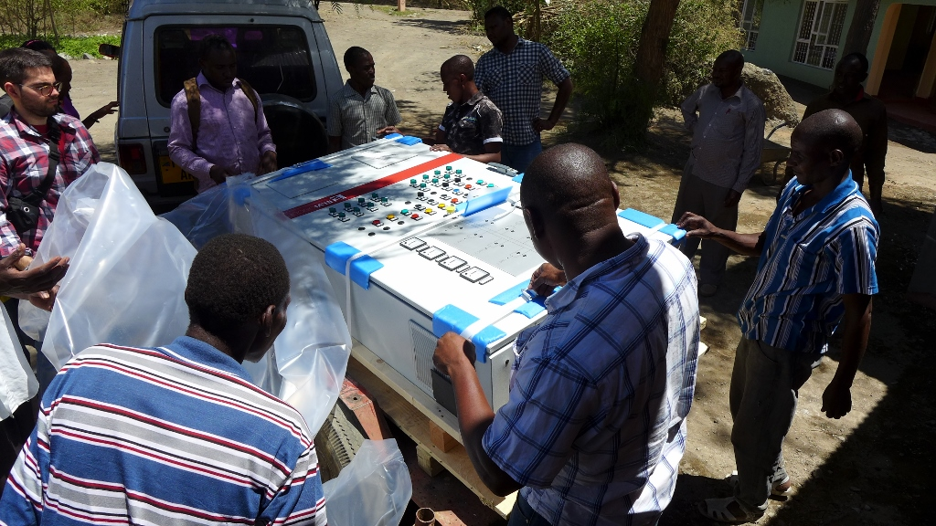 EKOenergie Solarprojekt in Tansania